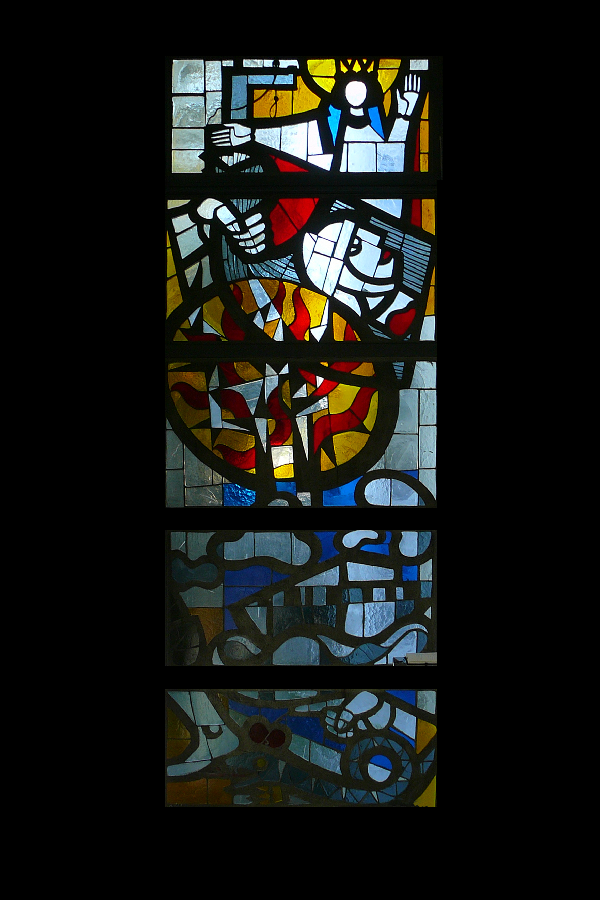 Römisch-katholische Pfarrkirche Bruder Klaus Urdorf, Glasfenster von Peter (Pierino) Travaglini